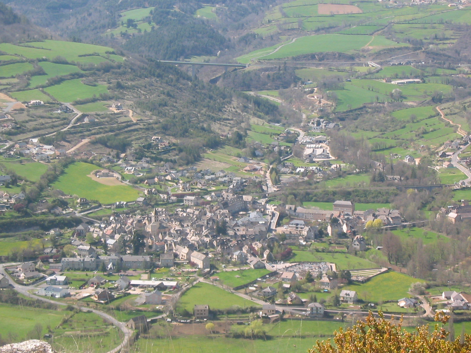 Chirac vu du haut du saint-bonnet